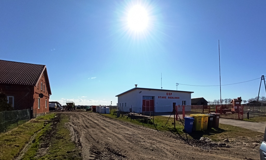 wieś w północnej Polsce, położona w województwie warmińsko-mazurskim, w powiecie braniewskim, w gminie Wilczęta, w zakolu Pasłęki.